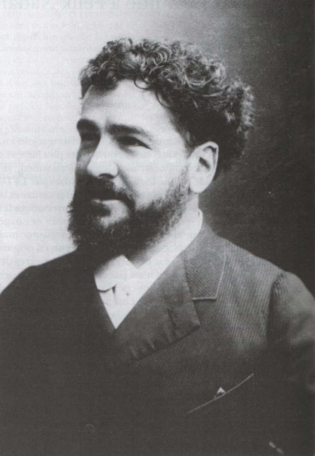 Fotografía de Octave Uzanne por Nadar.